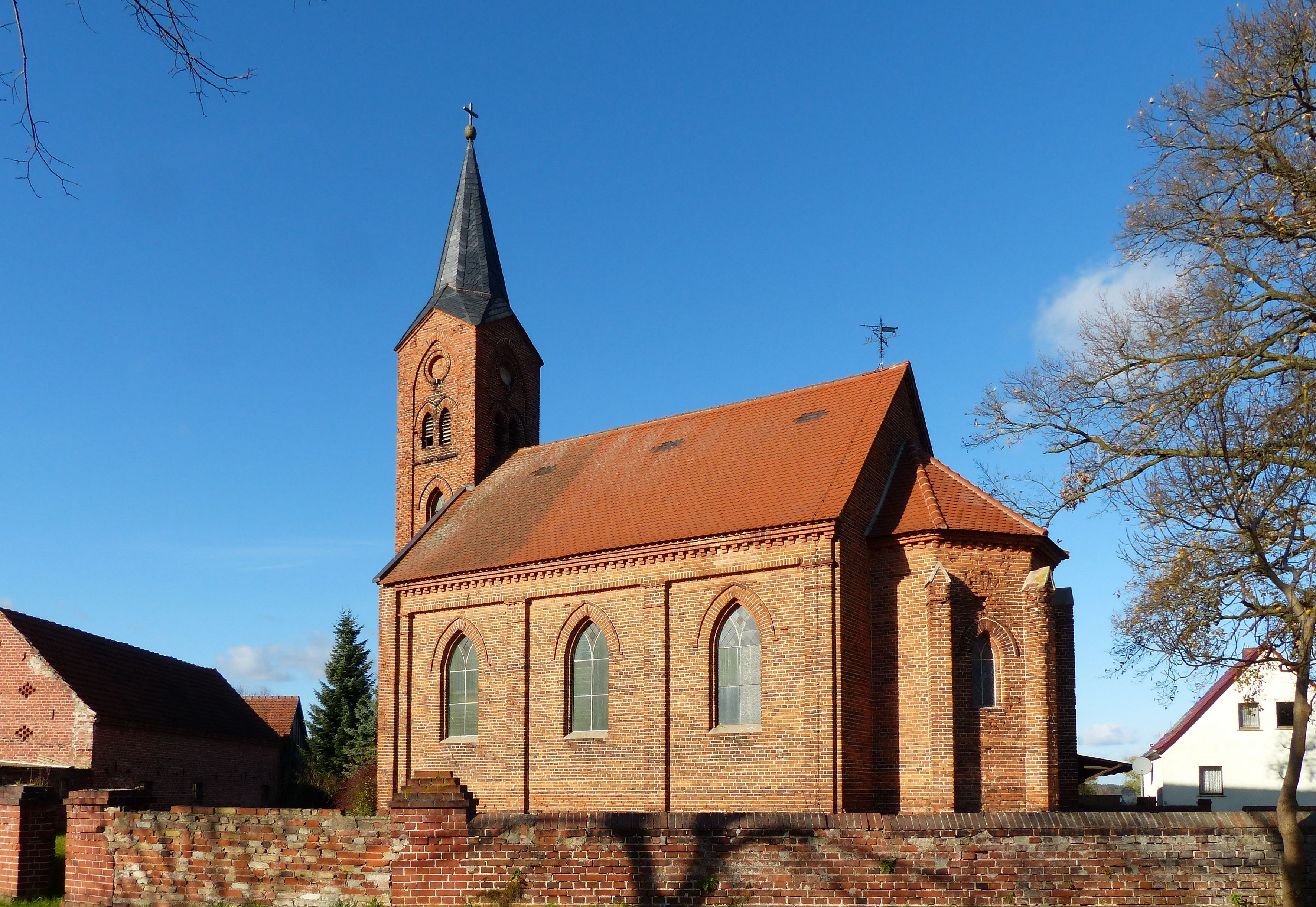 Die 1873 geweihte Kirche ersetzt einen Vorgängerbau, der einige Jahre zuvor durch einen Brand, der das ganze Dorf verwüstete, zerstört wurde.